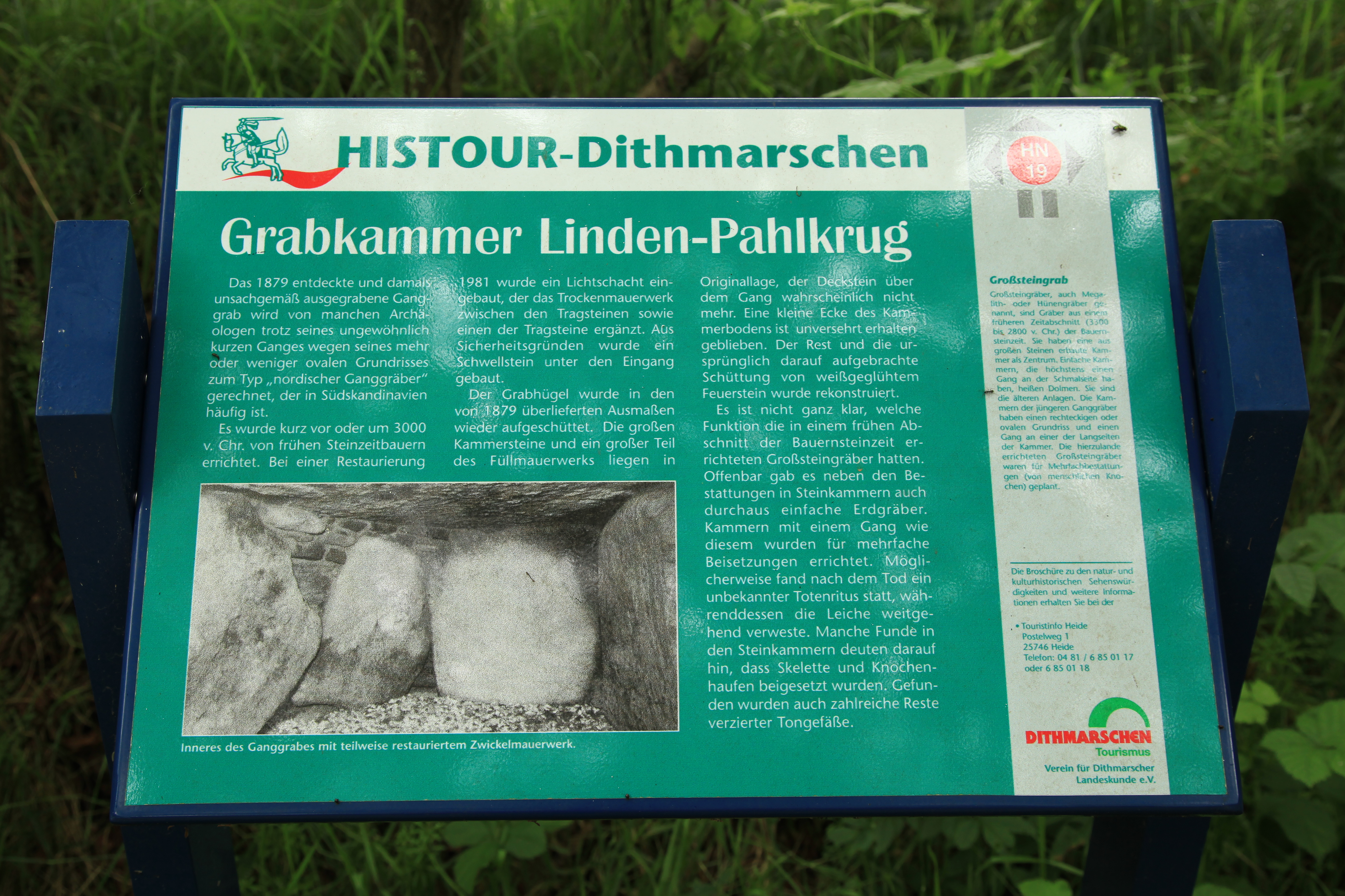 Grabkammer Linden-Pahlkrug in Linden (Dithmarschen)